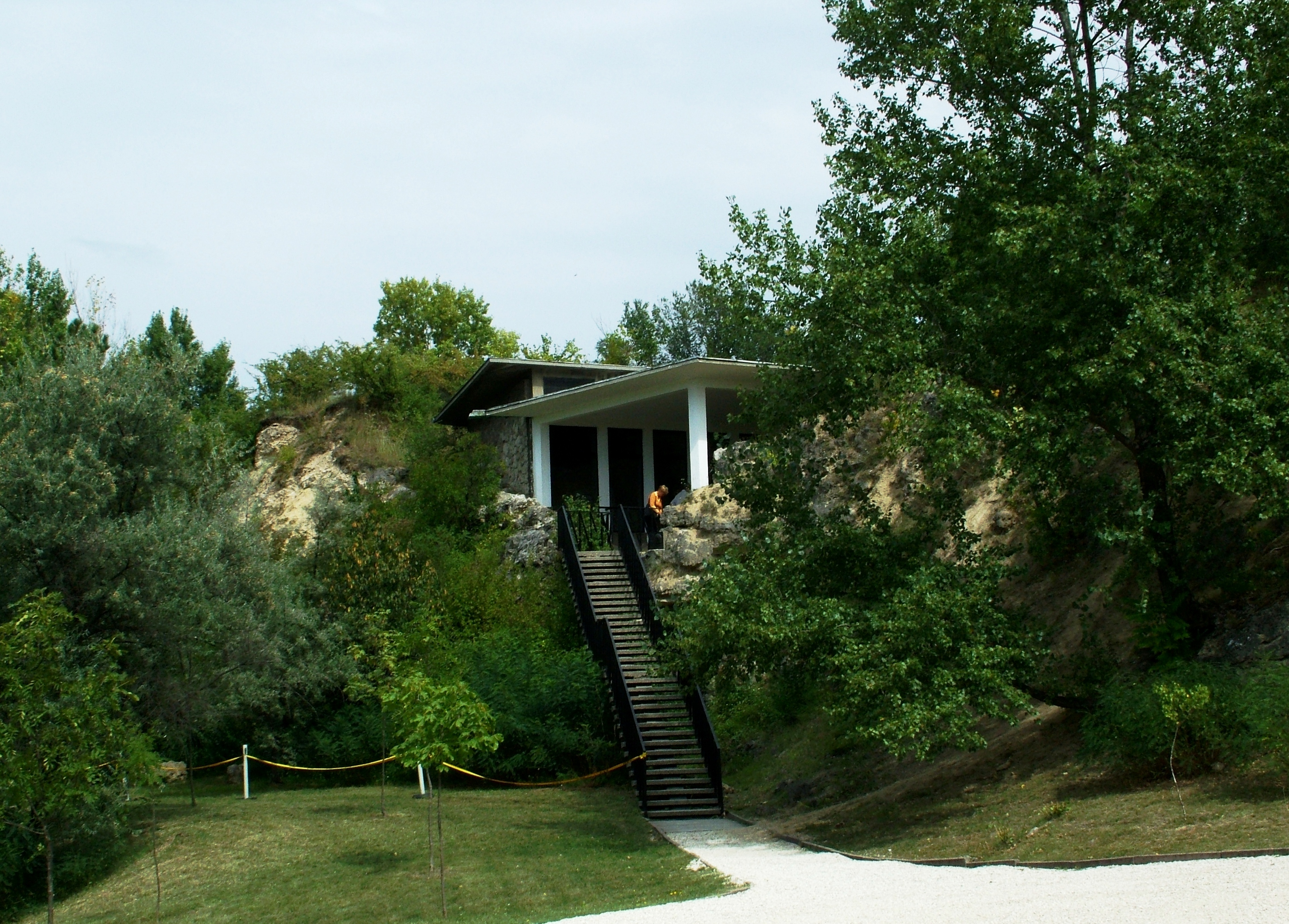 Kiállító pavilon (1-es helyszín) (Vértesszőlős Őstelep)